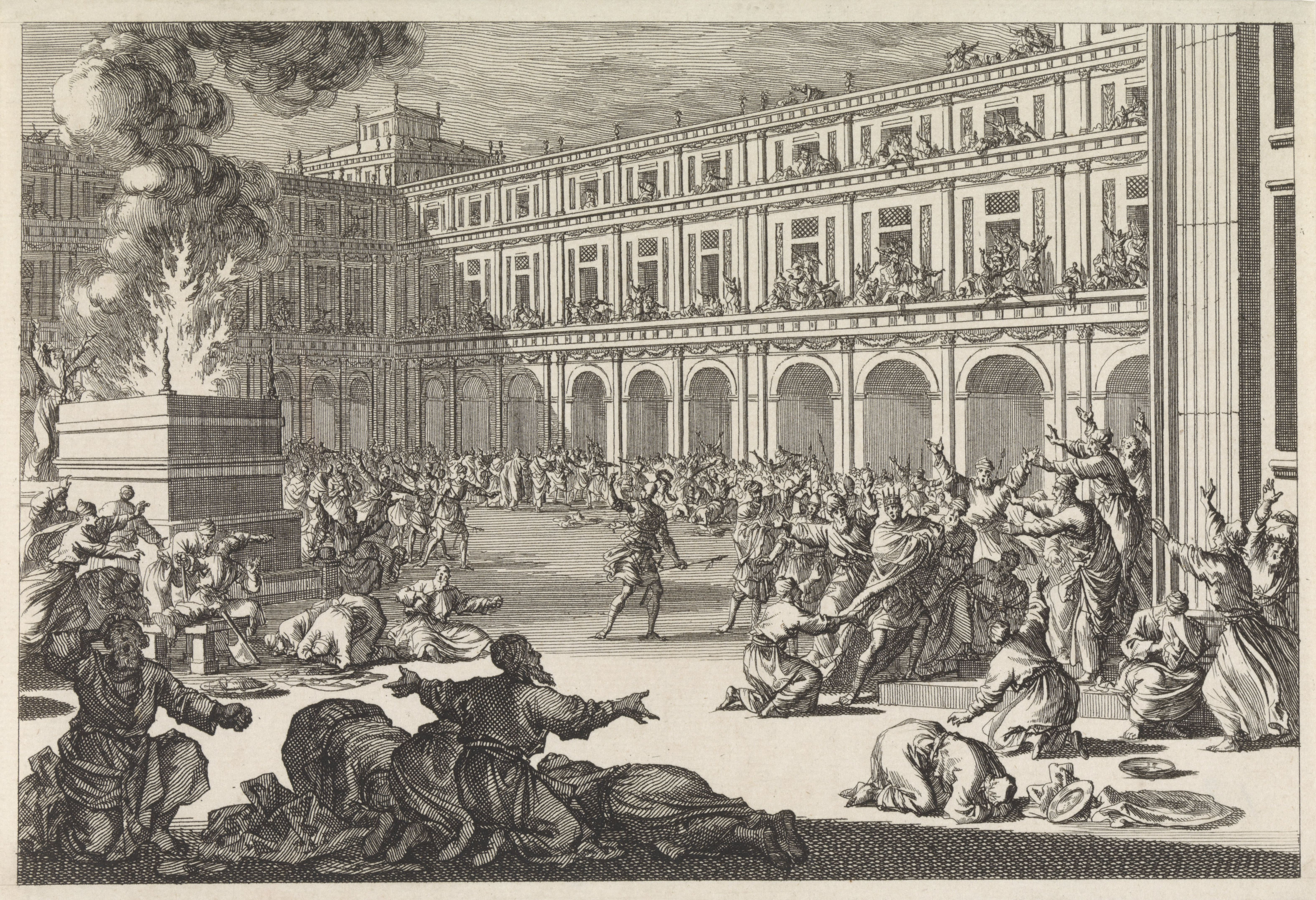 IdentificatieTitel(s): Koning Ptolemaeus Philopator krijgt een beroerte als straf voor zijn nieuwsgierigheid naar het Heilige der HeiligenObjecttype: prent Objectnummer: RP-P-OB-44.914Catalogusreferentie: Van Eeghen 26401(2)Opmerking: Twee staten bekendOpschriften / Merken: verzamelaarsmerk, verso midden onder, gestempeld: Lugt 2228Omschrijving: Het centrale plein van Jeruzalem met de tempel van Salomo. Wanneer koning Ptolemaeus Philopator het Heilige der Heiligen in de tempel tracht binnen te treden, krijgt hij een beroerte, afkomstig van God als straf voor zijn nieuwsgierigheid. Het Joodse volk bidt in paniek tot God.VervaardigingVervaardiger: prentmaker: Jan Luyken uitgever: Pieter Mortier (I)Plaats vervaardiging: AmsterdamDatering: 1700Fysieke kenmerken: ets; proefdrukMateriaal: papier Techniek: etsenAfmetingen: blad: h 144 mm × b 211 mmToelichtingProefdruk voor een boekillustratie voor David Martin. Historie des Ouden en Nieuwen Testaments, verrykt met meer dan vierhonderd printverbeeldingen. Amsterdam: Pieter Mortier, 1700.OnderwerpWat: King Ptolemy IV Philopator struck by paralysis for coming too close to the sanctuary in the temple of Jerusalem (3 Maccabees 1-2)Verwerving en rechtenVerwerving: onbekendCopyright: Publiek domein